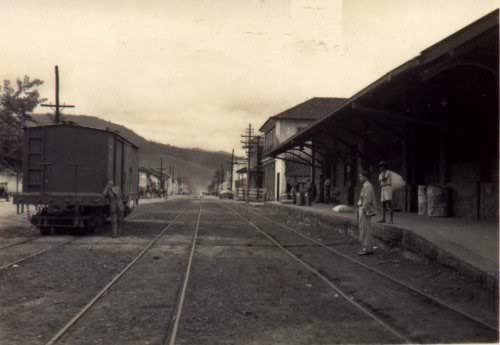 Avenida Victor Sence vista a partir da Estação Ferroviária em 1949. A foto foi encontrada nos relatórios do Processo de Emancipação de Conceição de Macabu.